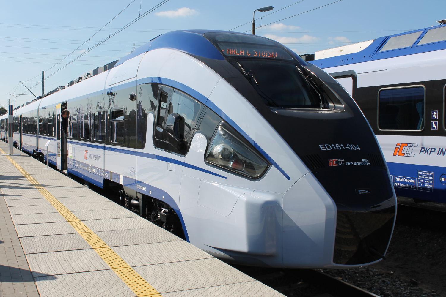 Elektryczny zespół trakcyjny Pesa Dart ED161-004 podczas targów Trako 2015. The making of this document was supported by Wikimedia Polska Association, within Wikigrant no. WG 2015-34.